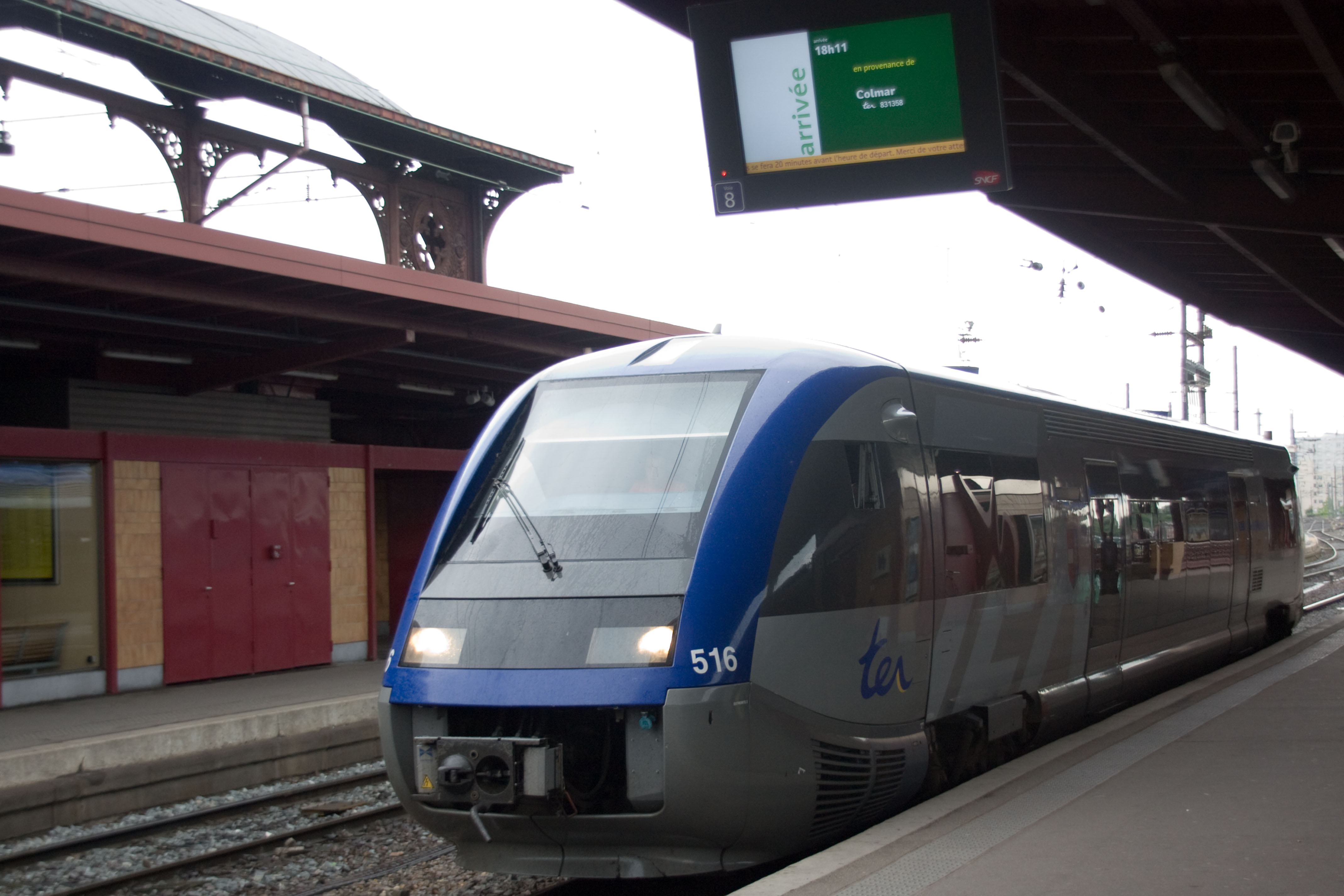 Gare de Strasbourg, Strasbourg, Bas Rhin.